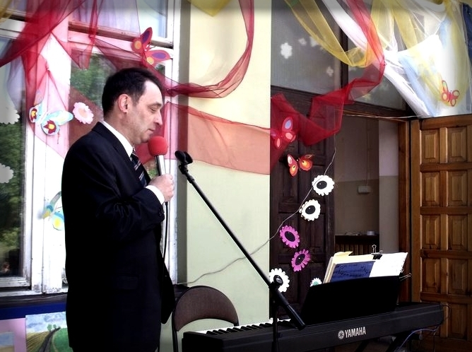 Robert Grudzień, artysta muzyk, kompozytor i dyrektor festiwali muzycznych - Honorowy Przyjaciel Szkoły w Wolanowie w koncercie dla uczniów